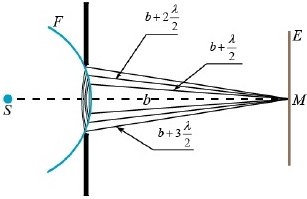 Fresnel Diffraction Scheme